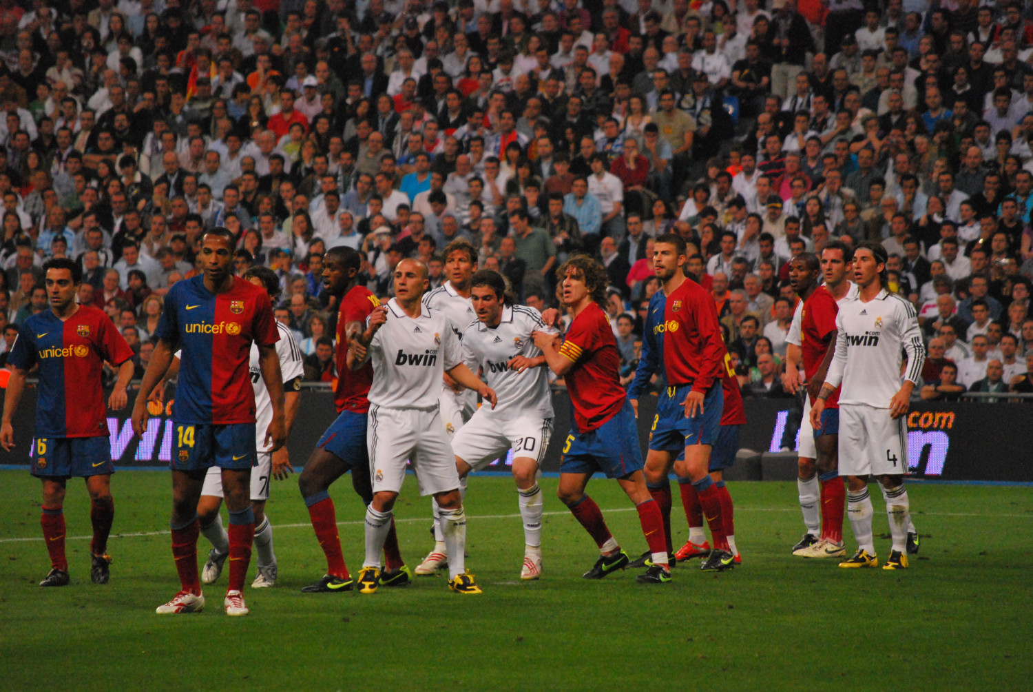 Los jugadores forcejean en un derby Real Madrid - Barça.